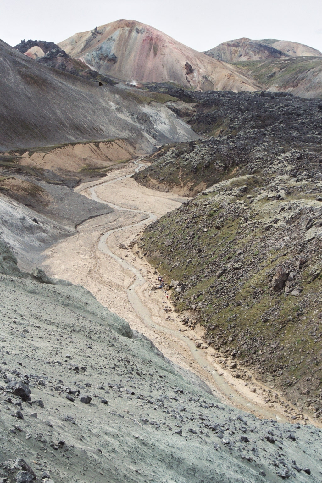 Le volcan Brennisteinsalda. La photographie a été prise en juillet 2004 par Johann Dréo (nojhan) depuis les contrefort du volcan Bláhnjúkur, sur le chemin qui monte au sommet, côté gîte. On aperçoit au premier plan la couleur bleu-verte caractéristique du Bláhnjúkur, et sur la droite la coulée de lave Laugahraun. Le sentier bas circule dans cette passe et rejoint le sentier haut au niveau des solfatars dont on aperçoit la vapeur au pied du Brennisteinsalda. Taille de l'image : 1536 x 1024, photographie numérisée à partir d'une pellicule argentique.